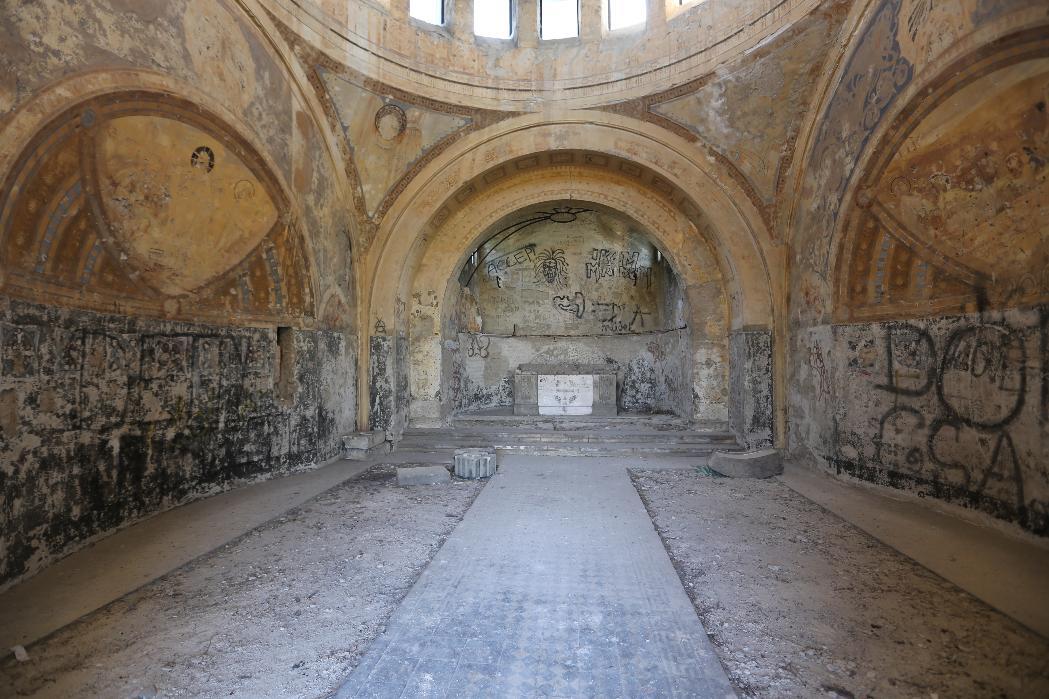 Törley-mauzóleum, Budapest XXII. kerület, Budafok, Sarló utca 6 This is a photo of a monument in Hungary. Identifier: 1285